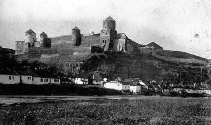 Zamek w Kamieńcu Podolskim na fotografii z przełomu XIX/XX wieku.